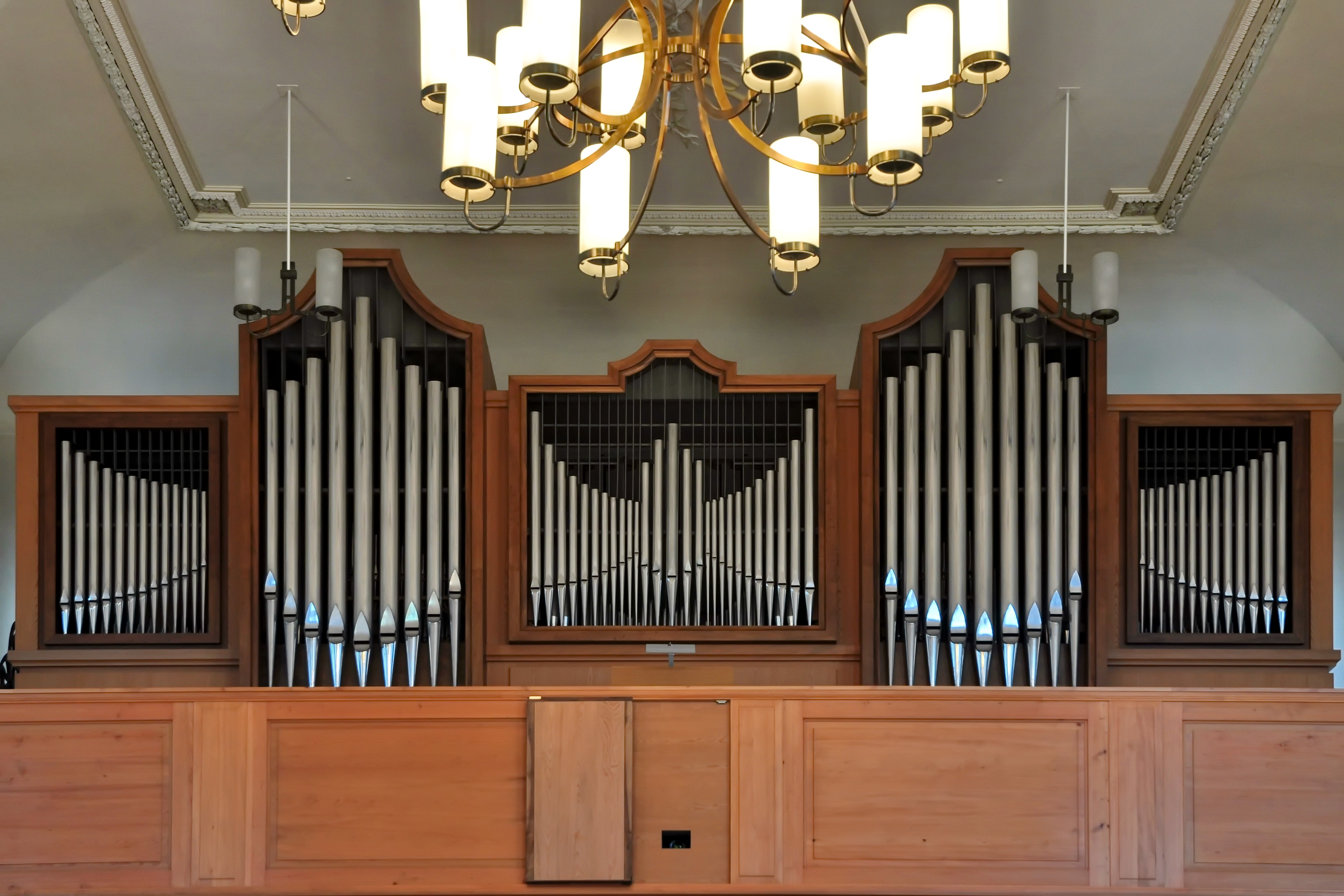 Reformierte Kirche, Bergstrasse in Gossau (Switzerland)